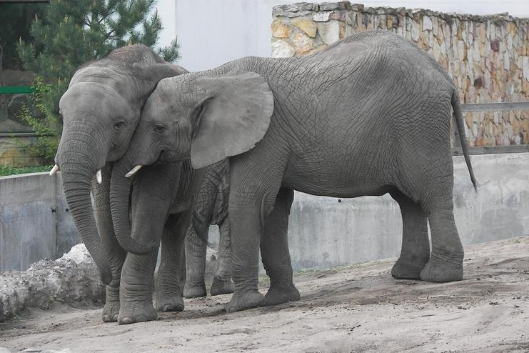 Przytul mnie...